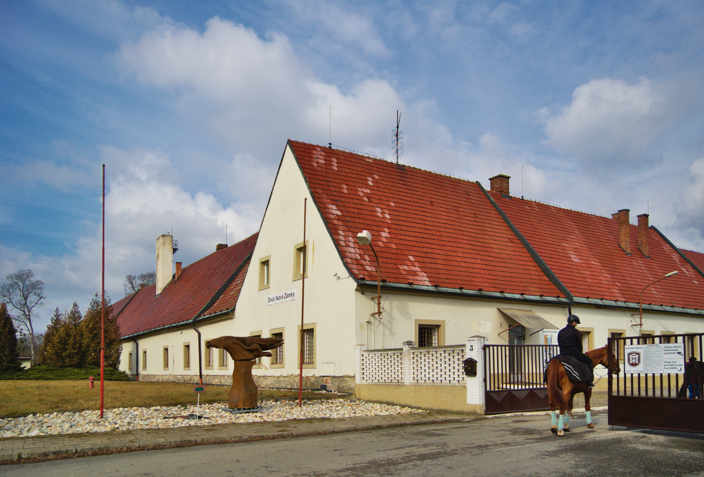 Dvůr Nové Zámky, Mladeč, okres Olomouc